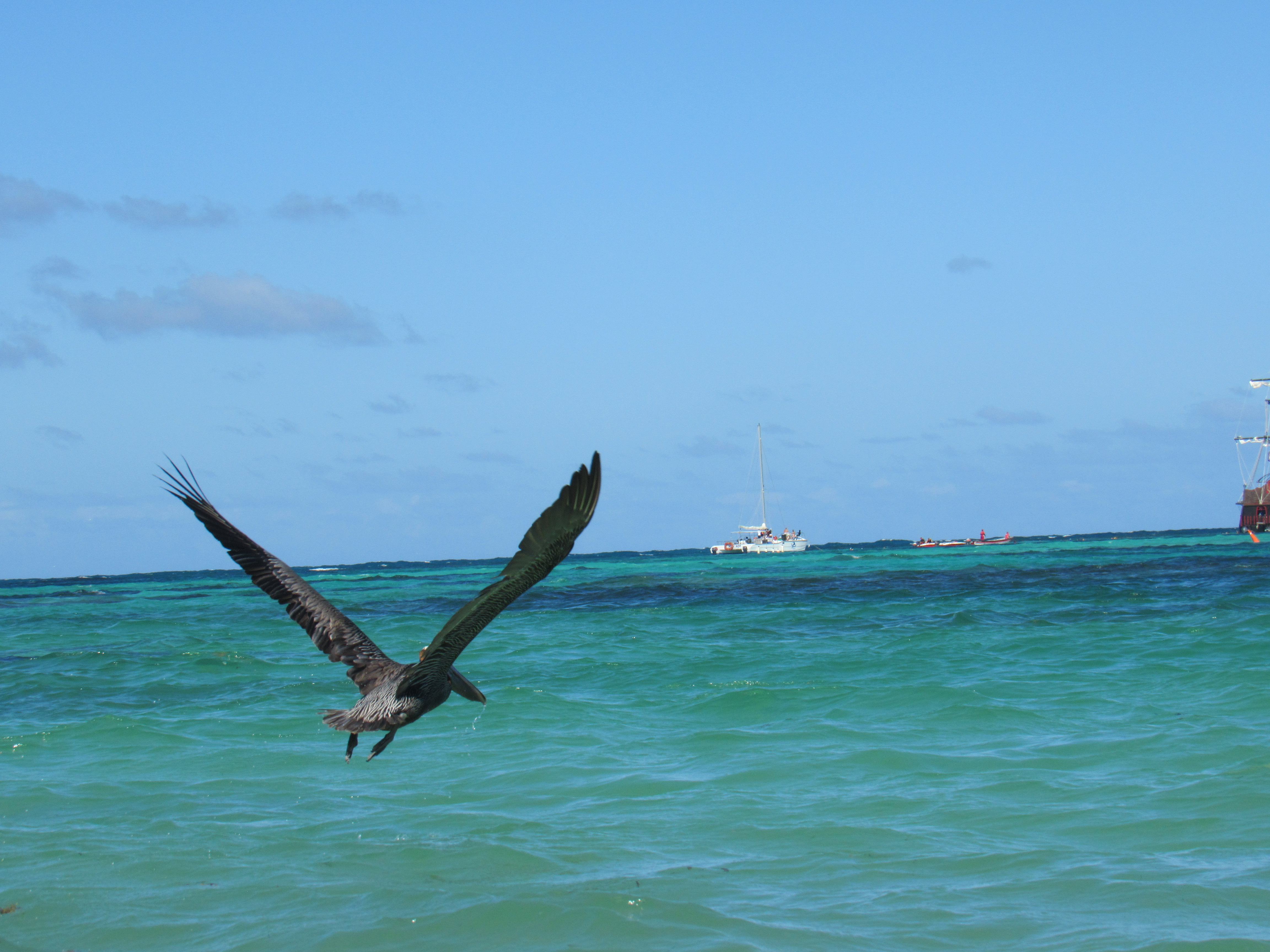 Pelecanus occidentalis occidentalis (Pelícano del Caribe) alzando vuelo tras un intento fallido de capturar peces. Playa Bavaro, Punta Cana, República Dominicana.